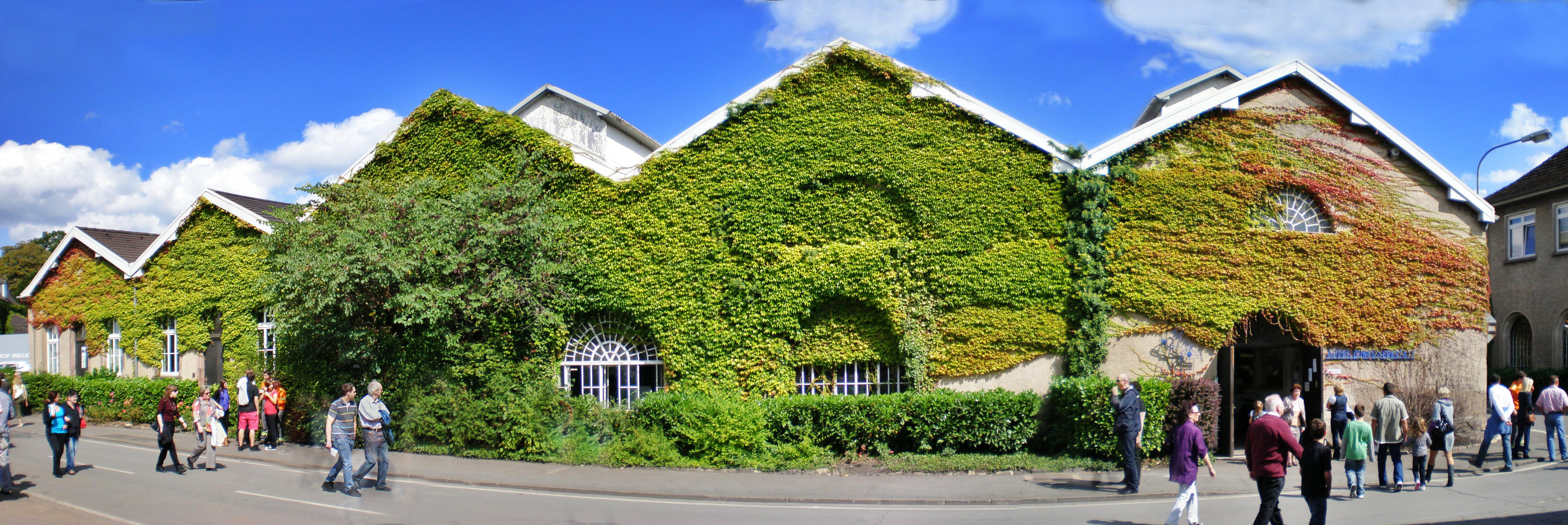 Ältere Hallen der Dillinger Hütte